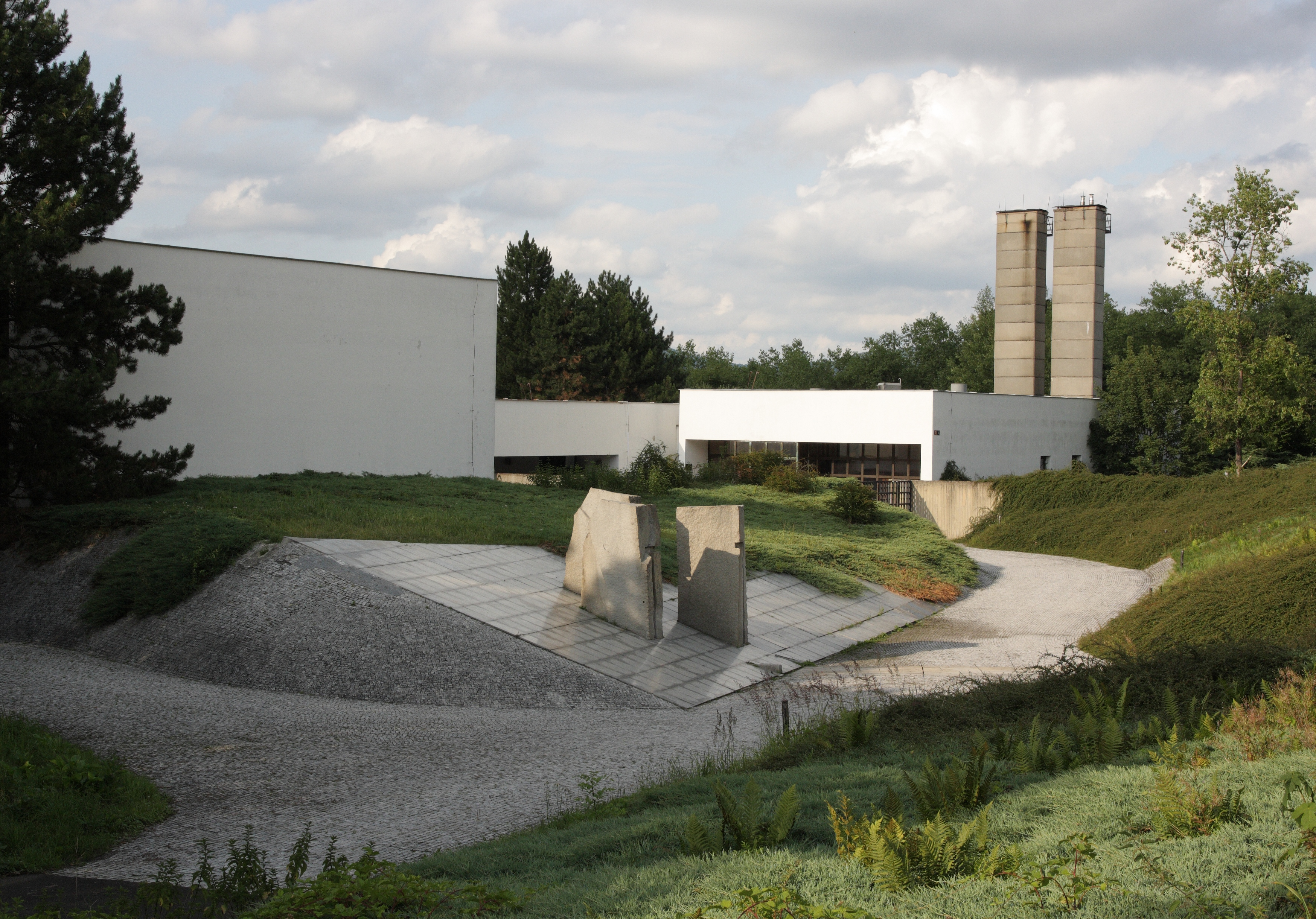 Ústí nad Labem, Střekov - nové krematorium